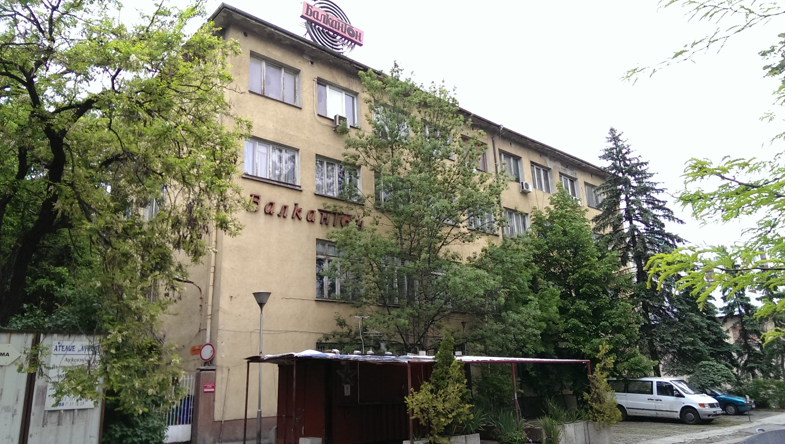 Балкантон днес